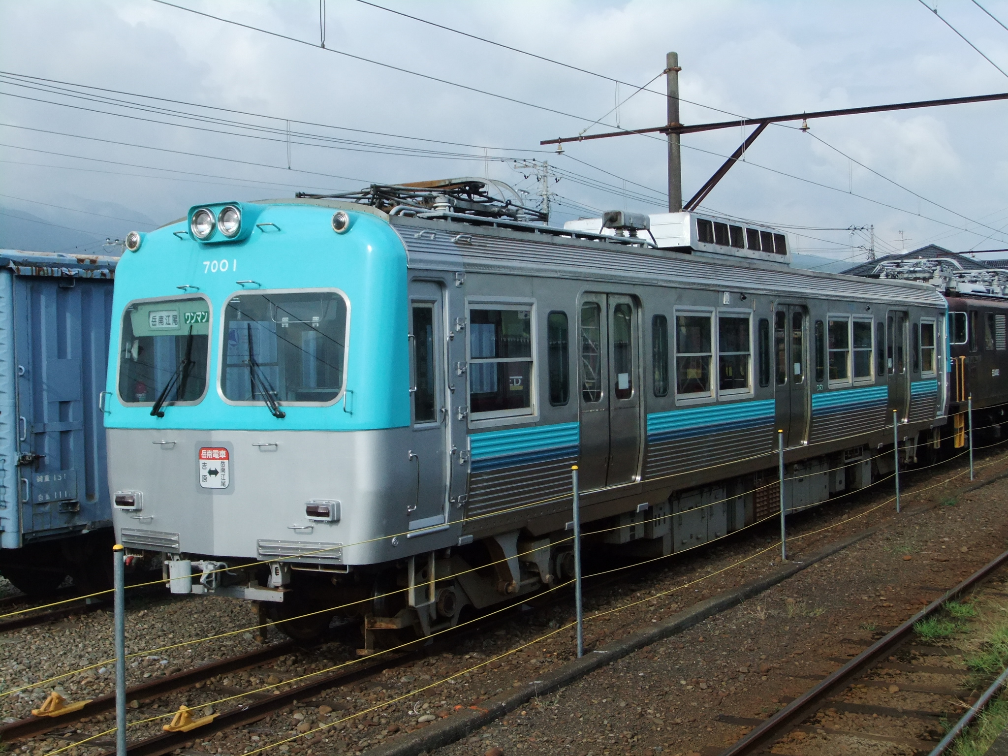 京王井の頭線カラーとなった岳南電車7001